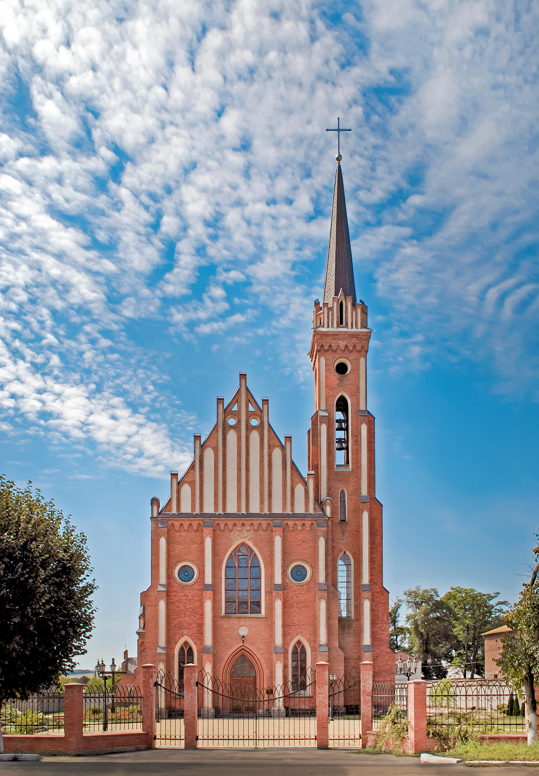 Костьол св. Йозефа, Гнівань, вул. Леніна